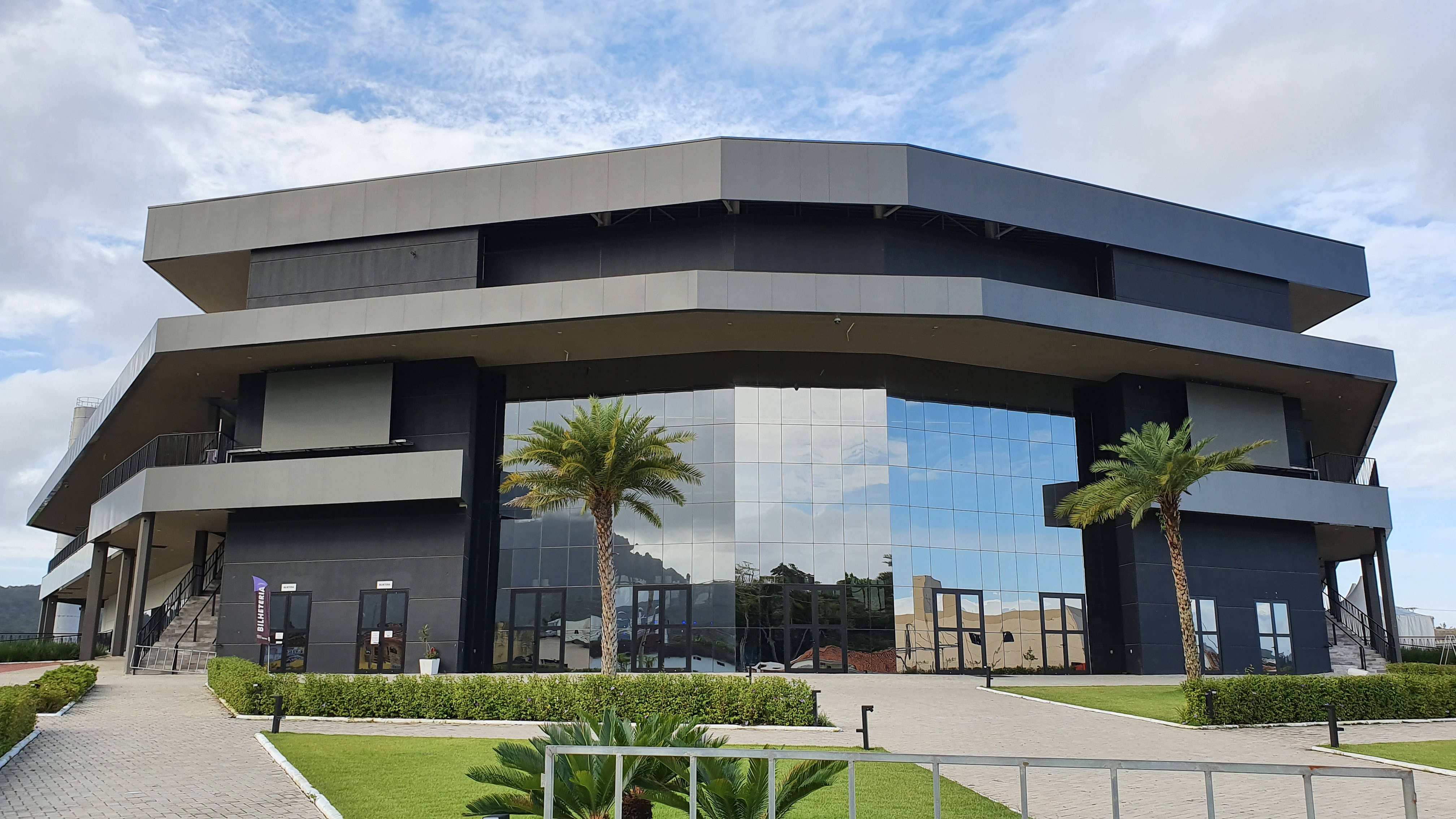 Fachada frontal da Arena Petry em fevereiro de 2020.